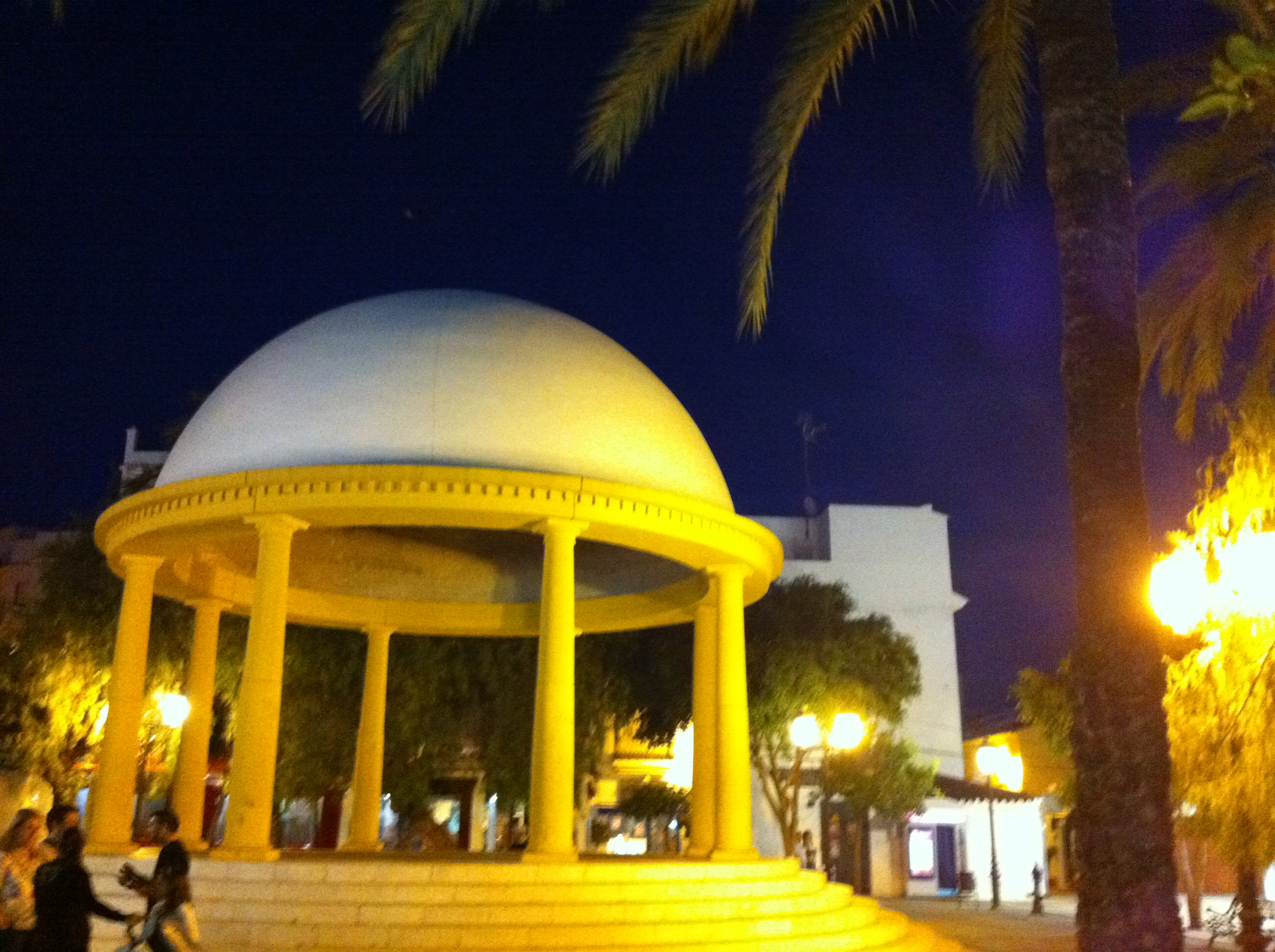 Estepona